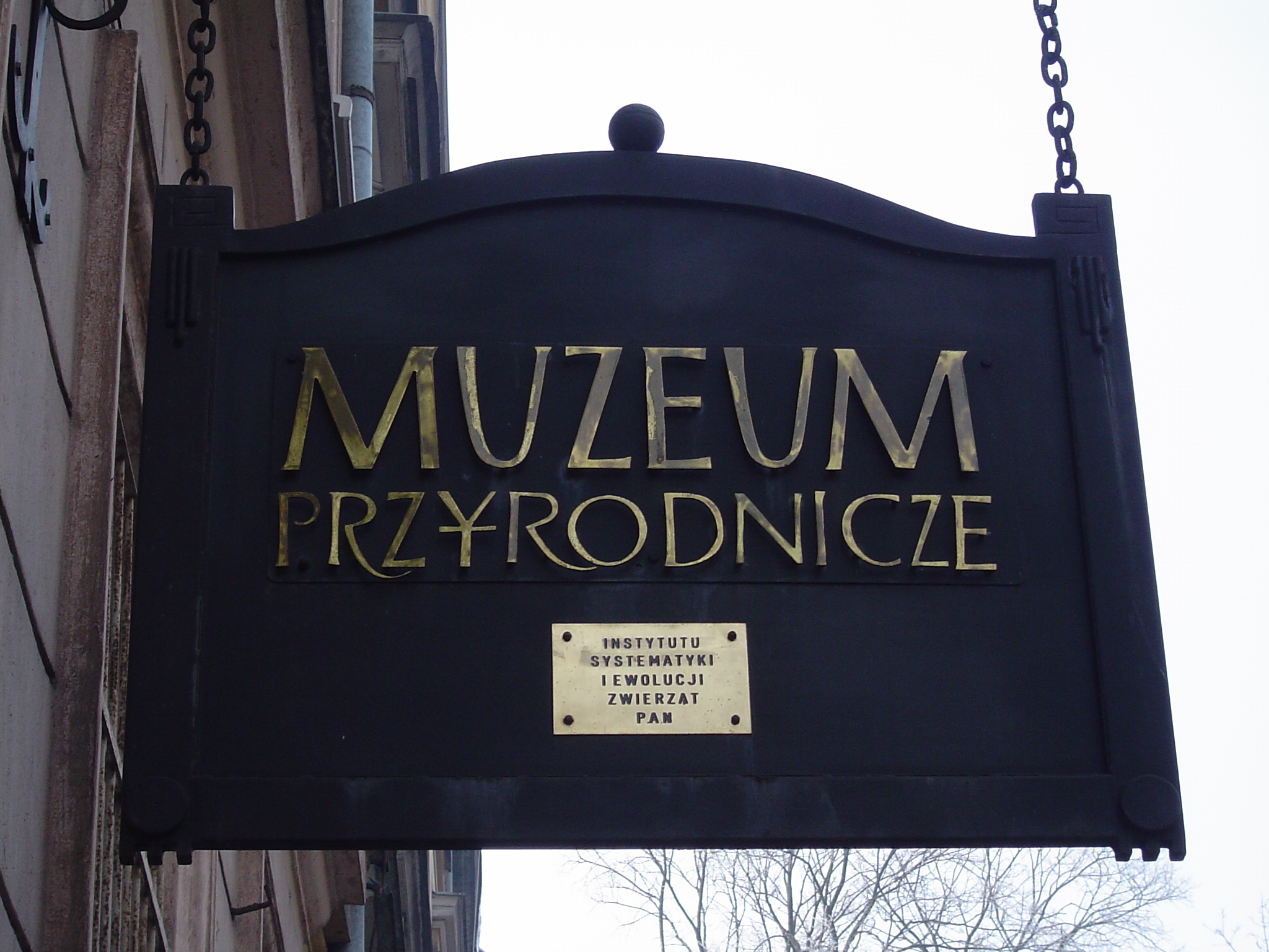 Szyld - Muzeum Przyrodnicze PAN